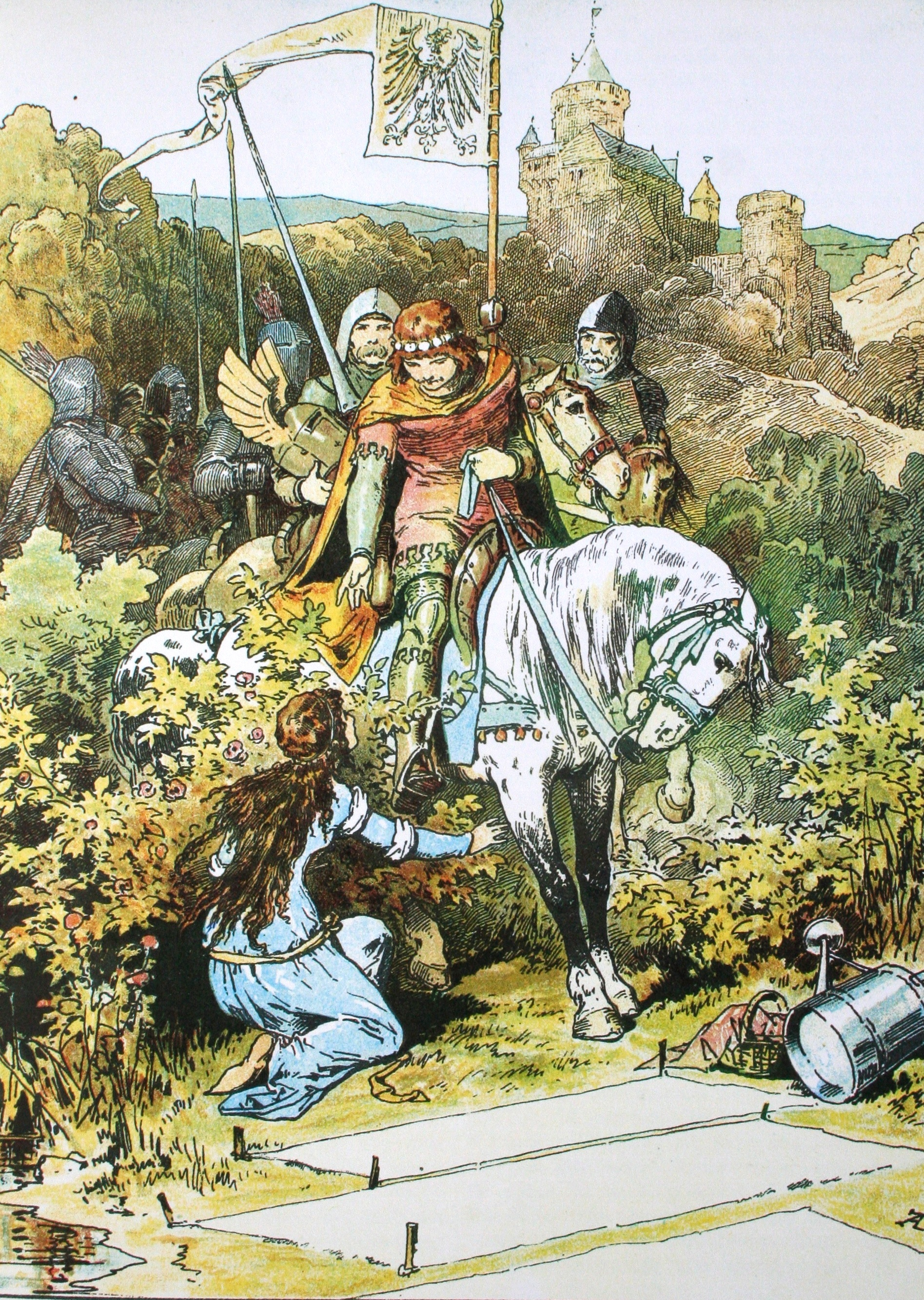 Die drei Schwestern; Darstellung von Alexander Zick (1845 - 1907)